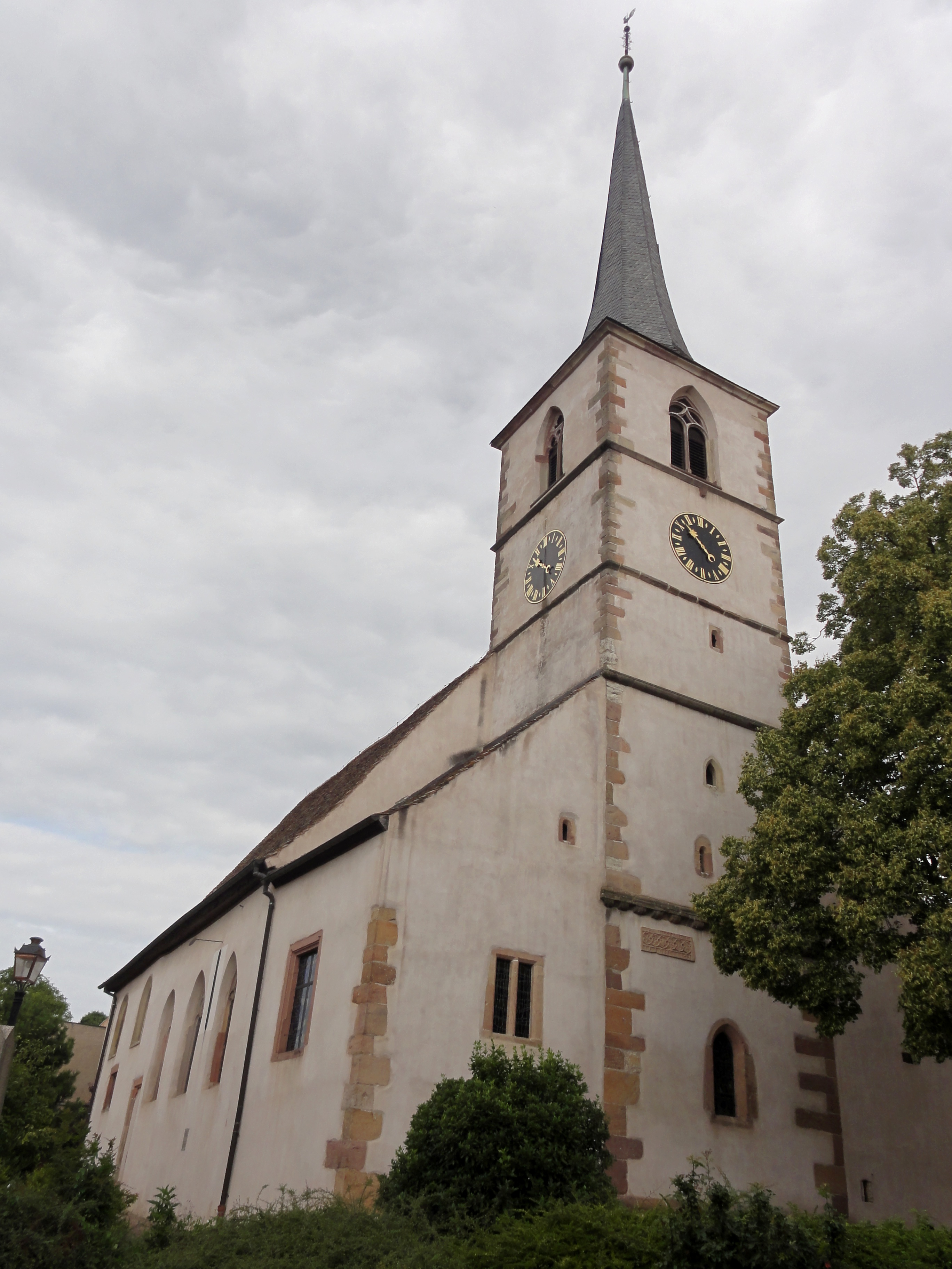 Alsace, Bas-Rhin, Église protestante Saint-Étienne de Mittelbergheim (IA00115378).